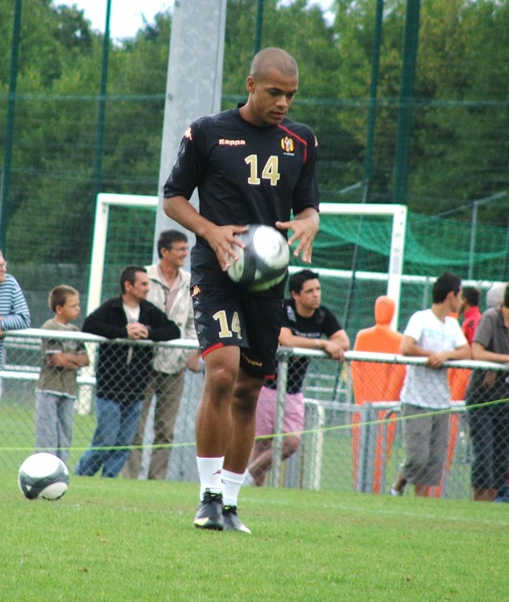 Mathieu Dossevi lors d'une séance d'entrainement du MUC 72 le jeudi 27 Août 2009.